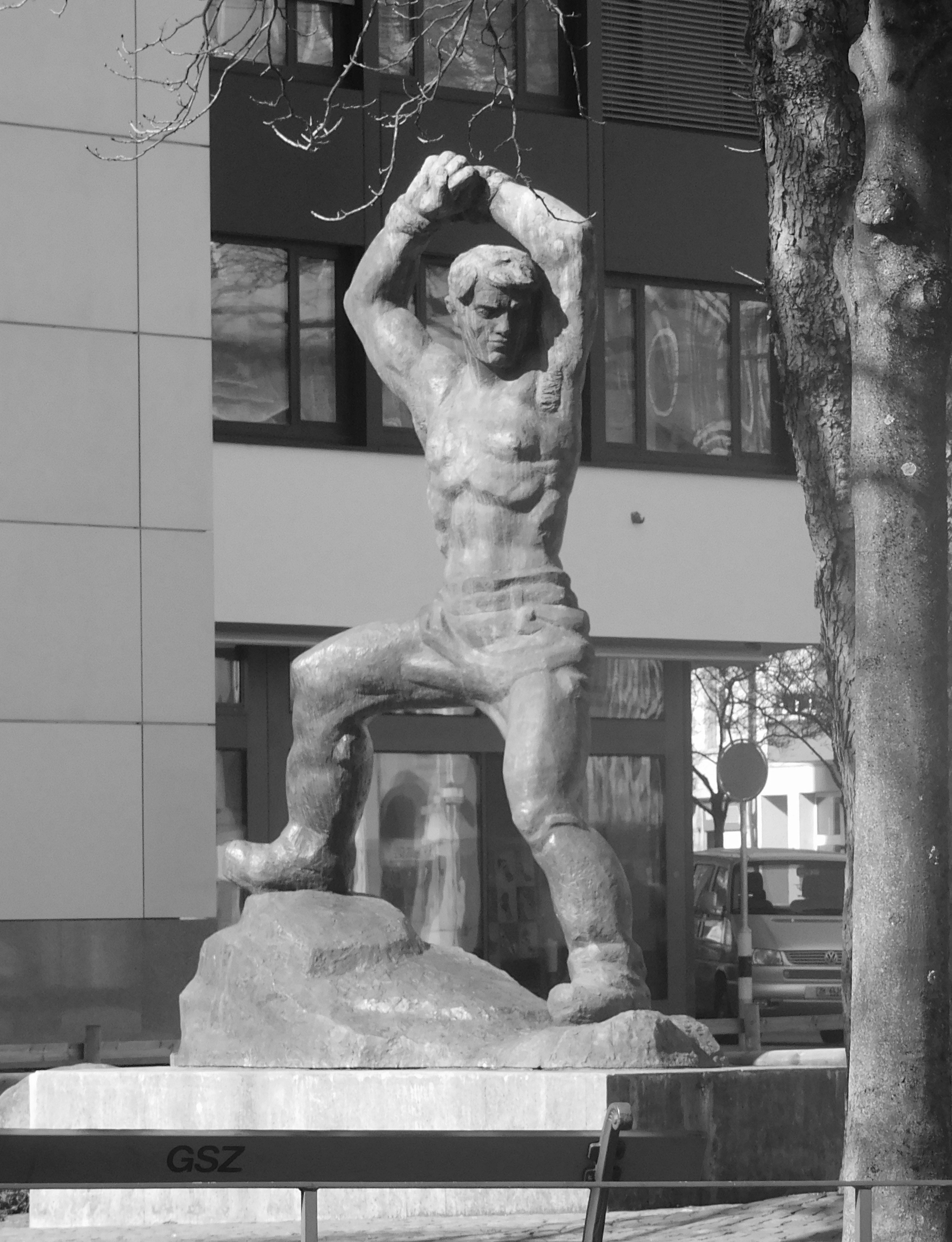 Werner F. Kunz (1896-1981): Befreiung (1962, Bronze) in Zürich-Aussersihl, Werdplatz; Geschenk der Gewerkschaften an die Stadt Zürich